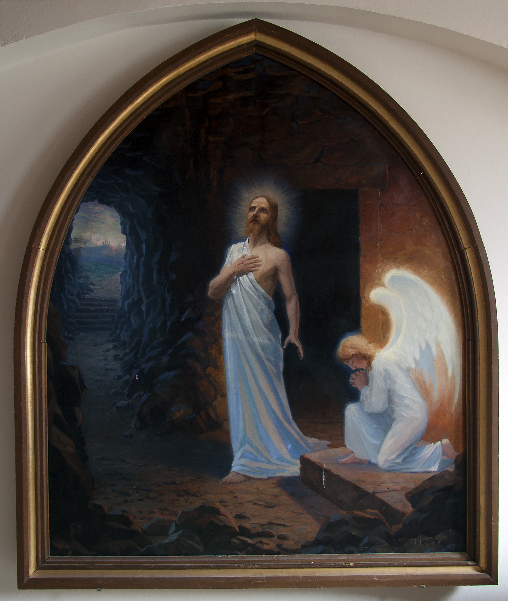 Gamla altartavlan i Hässleholms kyrka, numera placerad i kryptan. Tavlan målades av Georg Hansen, 1868–1932.